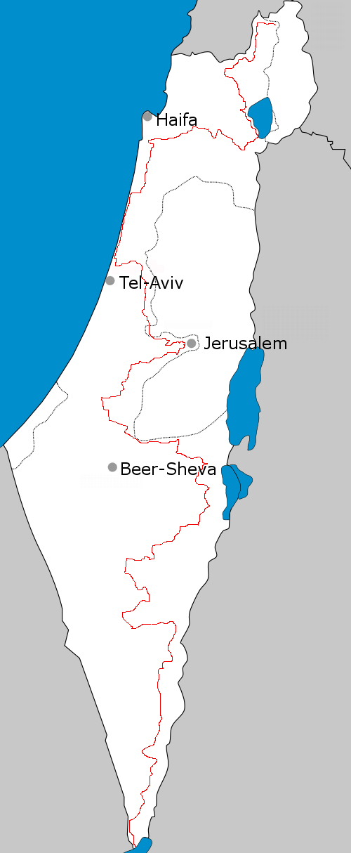 INT map